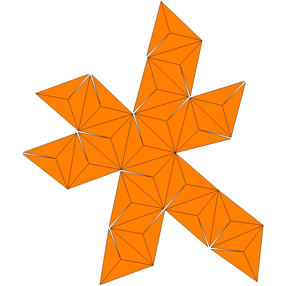 Triakisicosahedron net